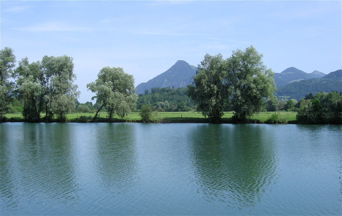 Kreuthsee, Kiefersfelden, Badesee, im Hintergrund das Kranzhorn